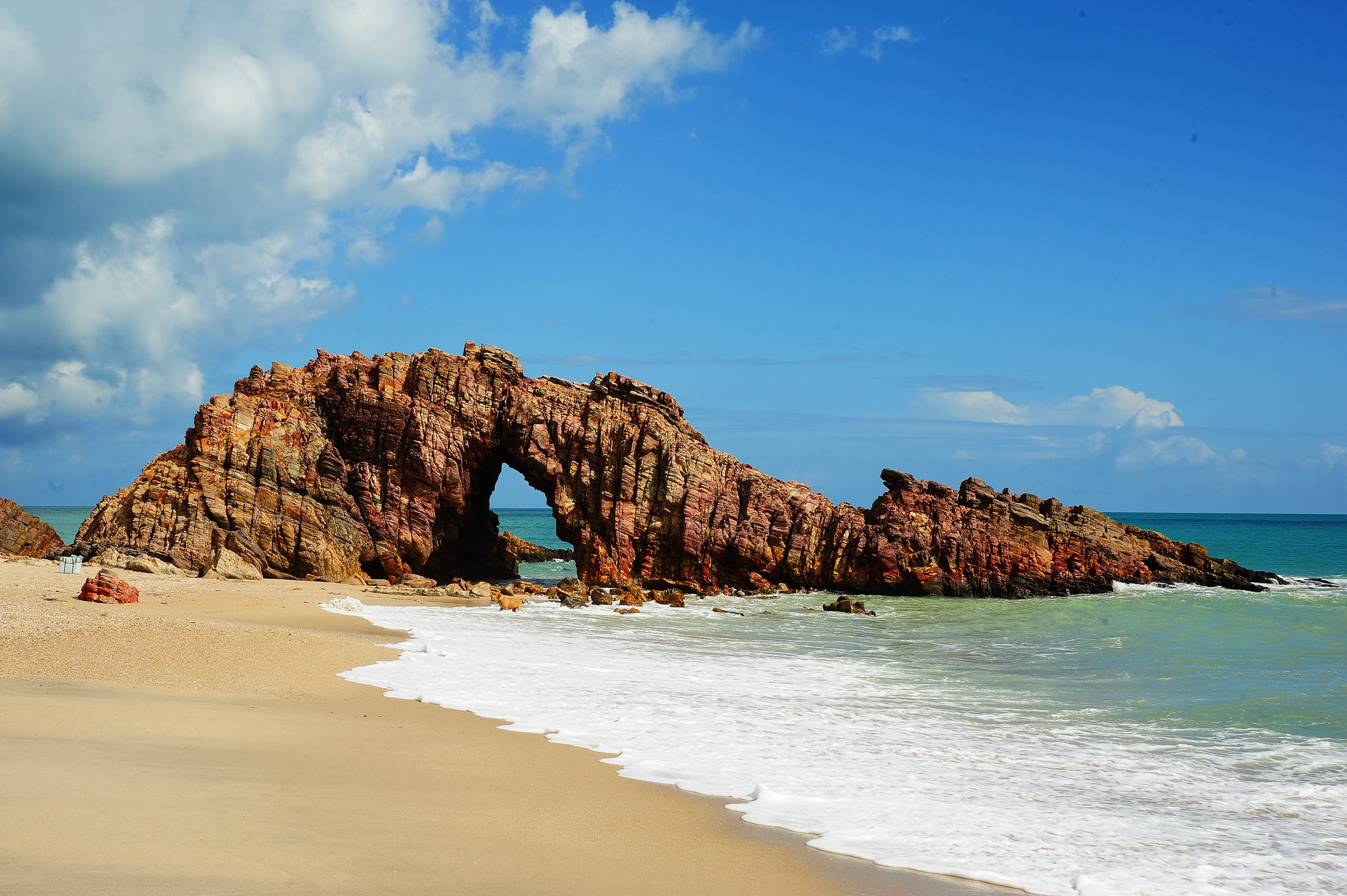 Imagem fotografada no âmbito de jericoacoara/ce